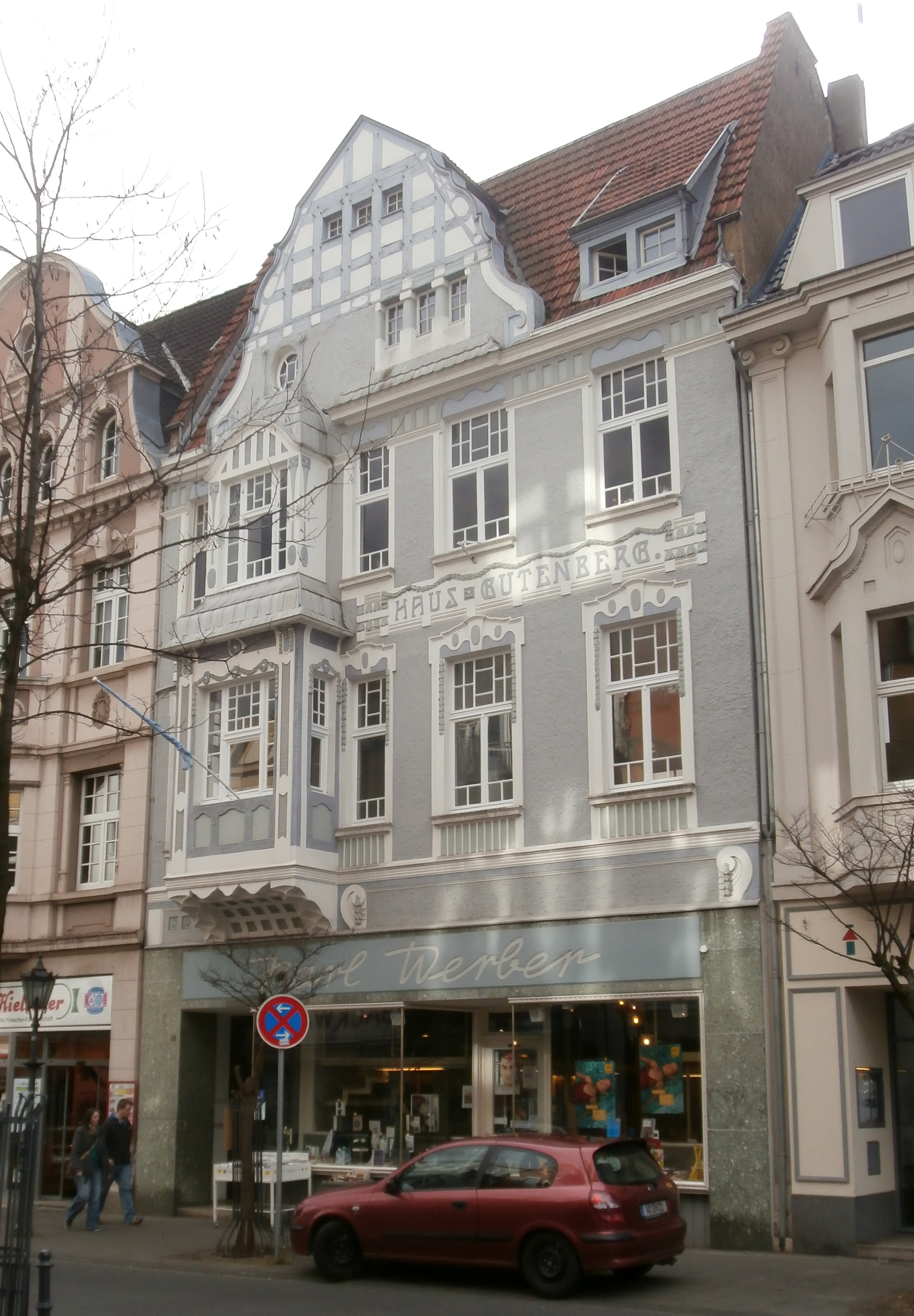 Denkmalgeschütztes Wohn- und Geschäftshaus, Hauptstraße 40, Bad Honnef